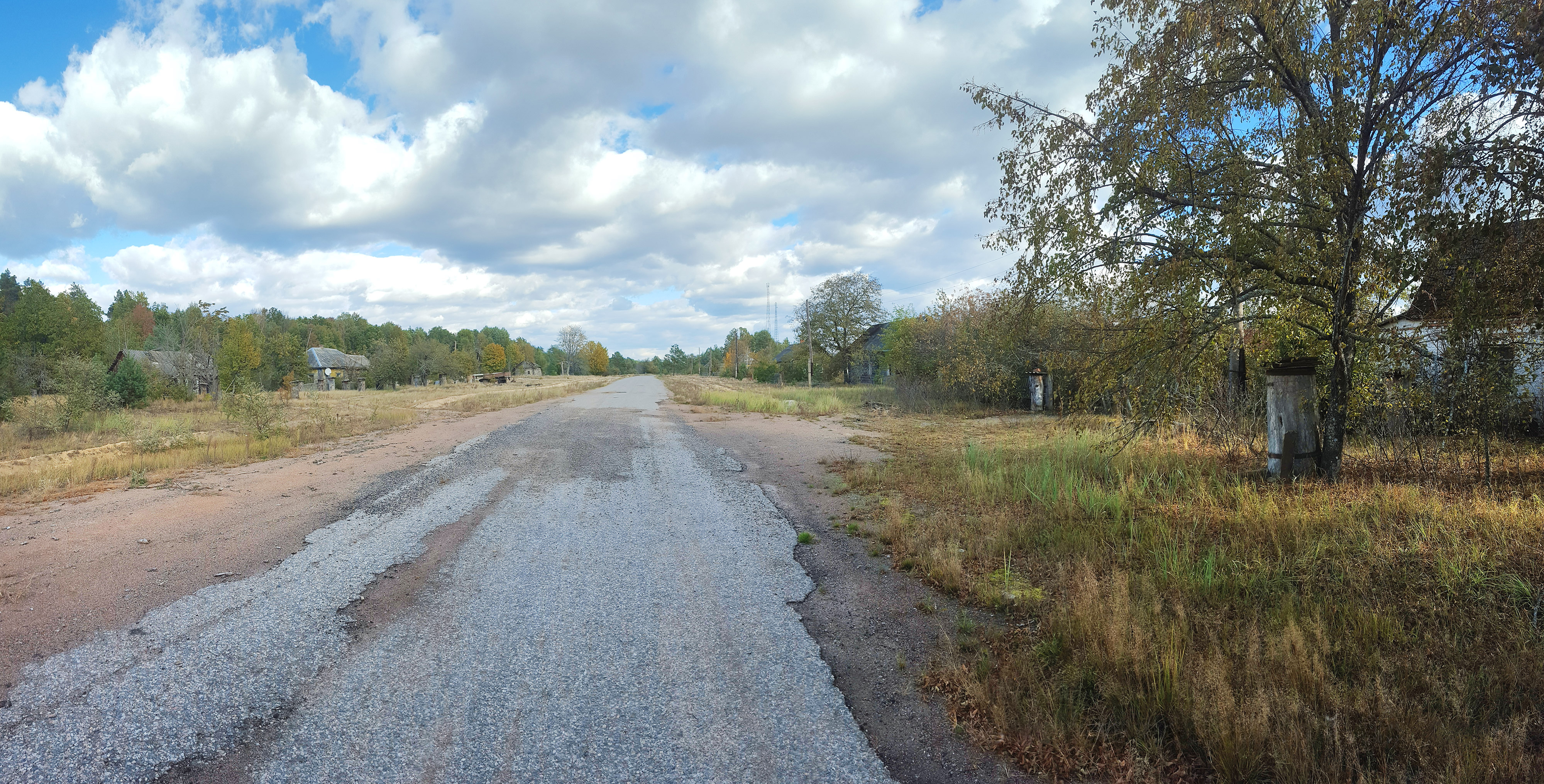 Панорама на в'їзді в Борутине.